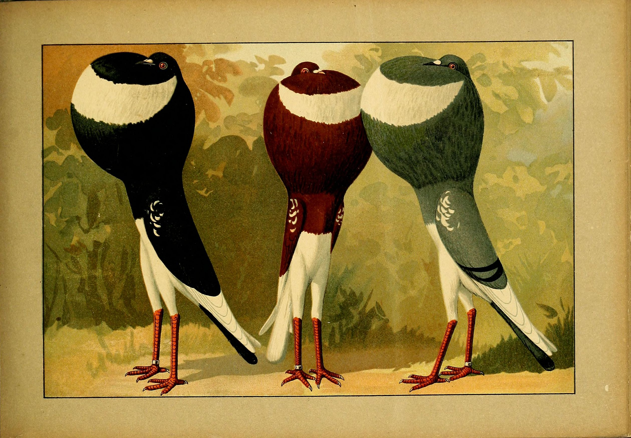 Deutsch